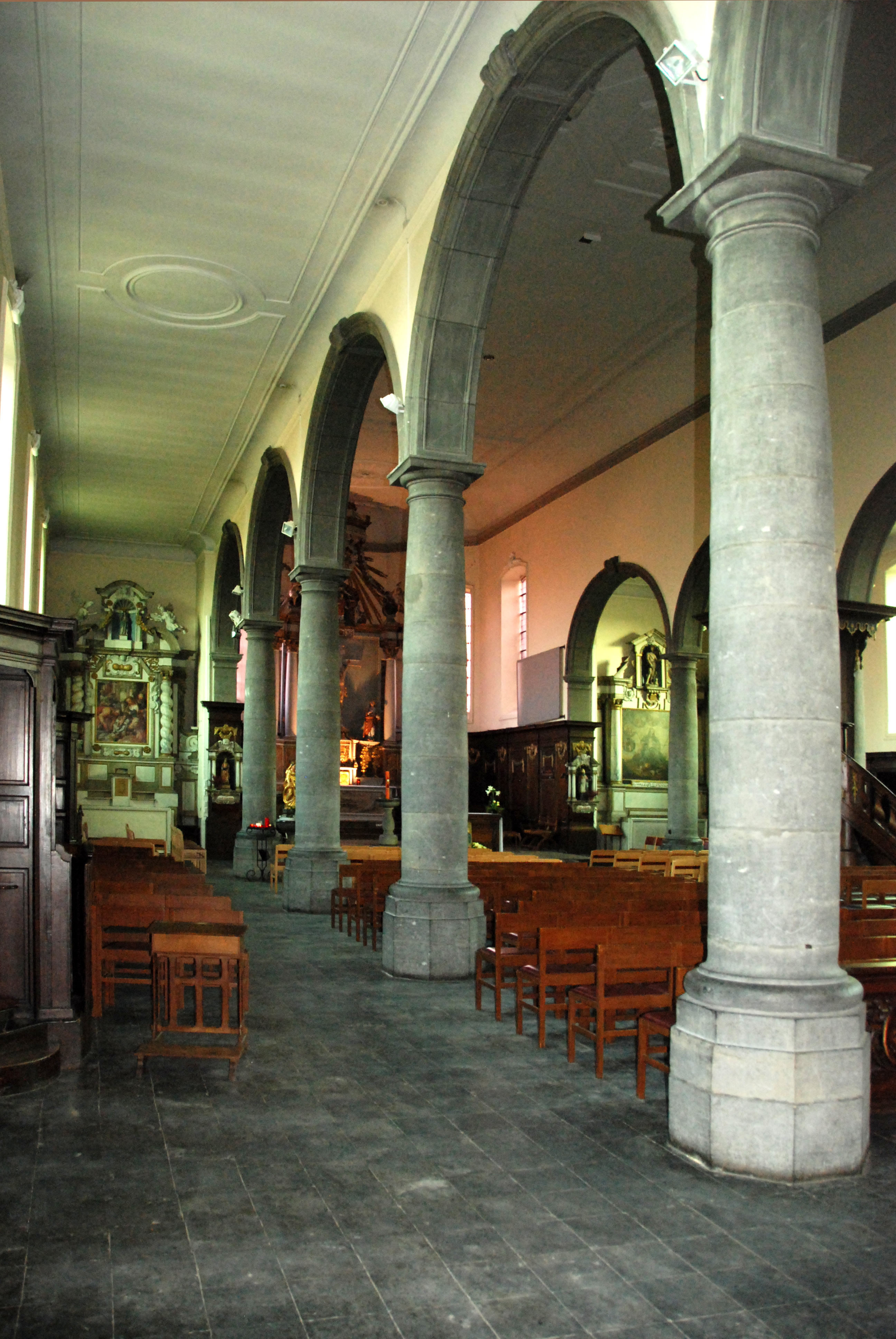 Belgique - Brabant wallon - Église de Court-Saint-Étienne